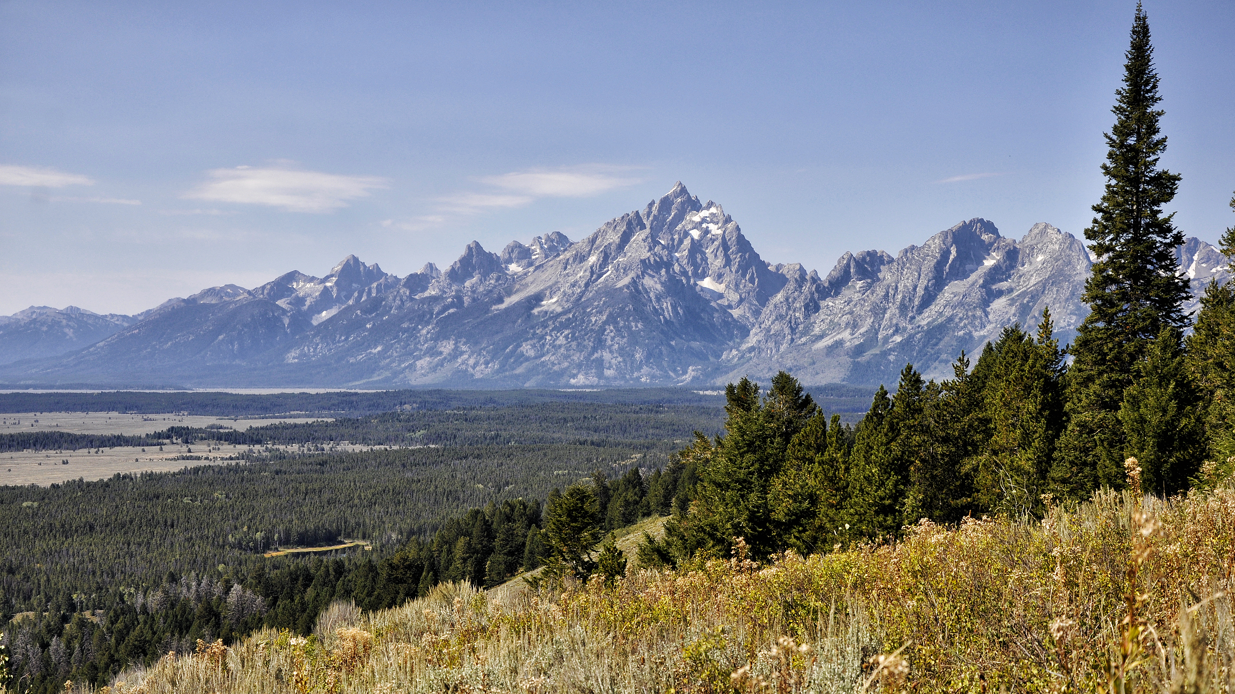 Het Tetongebergte vanaf Signal Mountain (Wyoming). Foto genoemen in zuidwestelijke richting